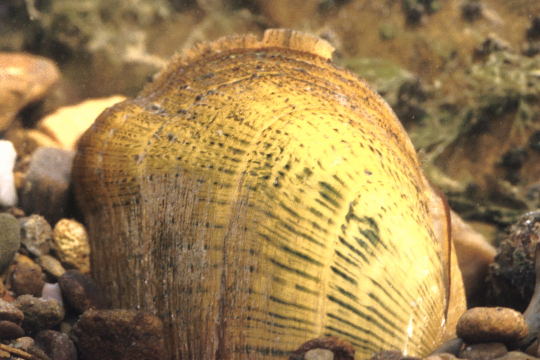 Epioblasma brevidens